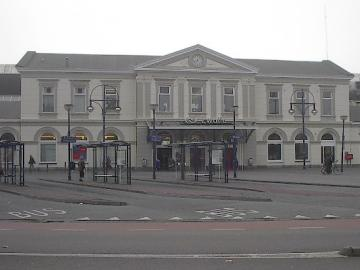 Station Zwolle (voorkant)